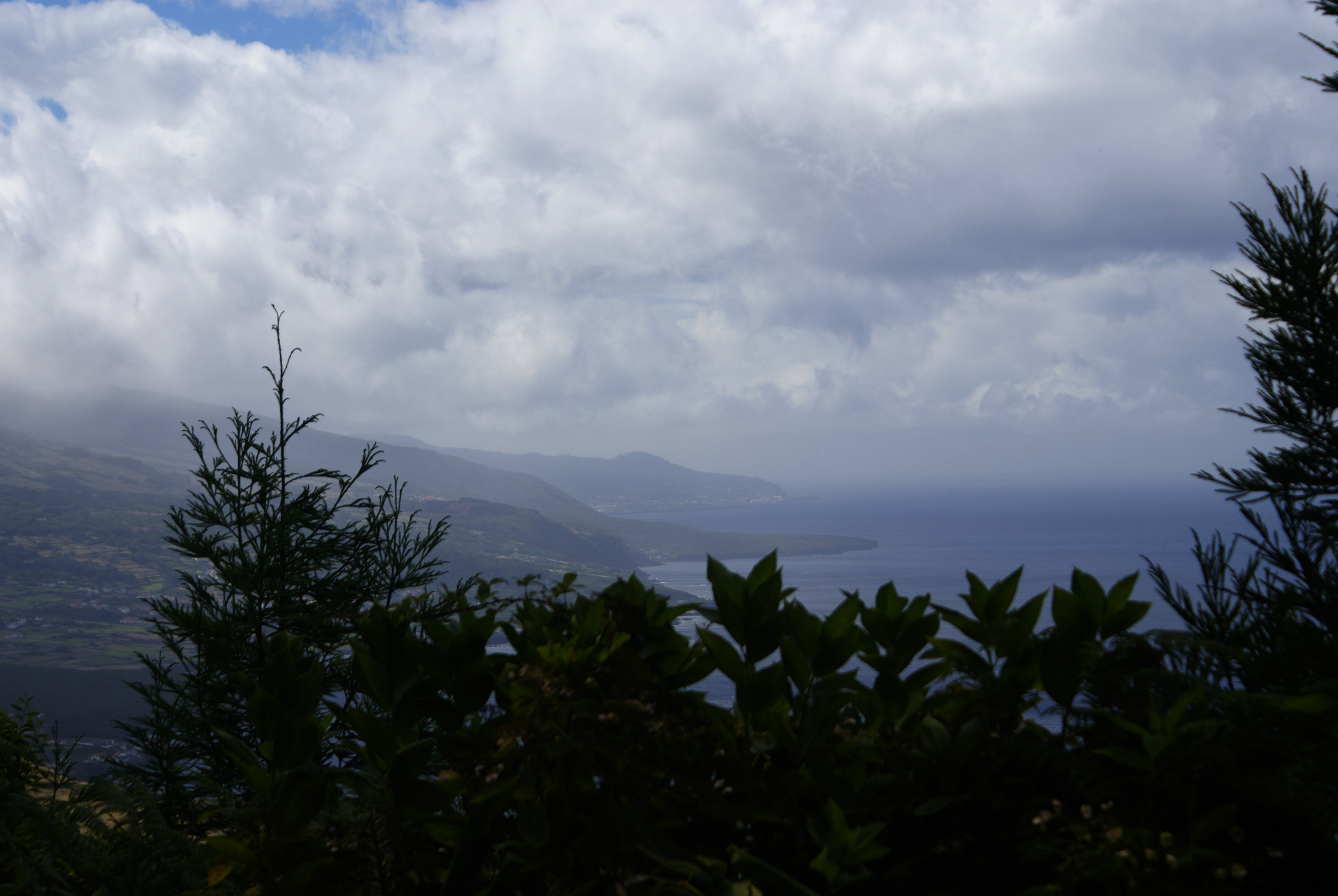 Miradouro da Terra Alta, concelho das Lajes do Pico, ilha do Pico, Açores, Portugal